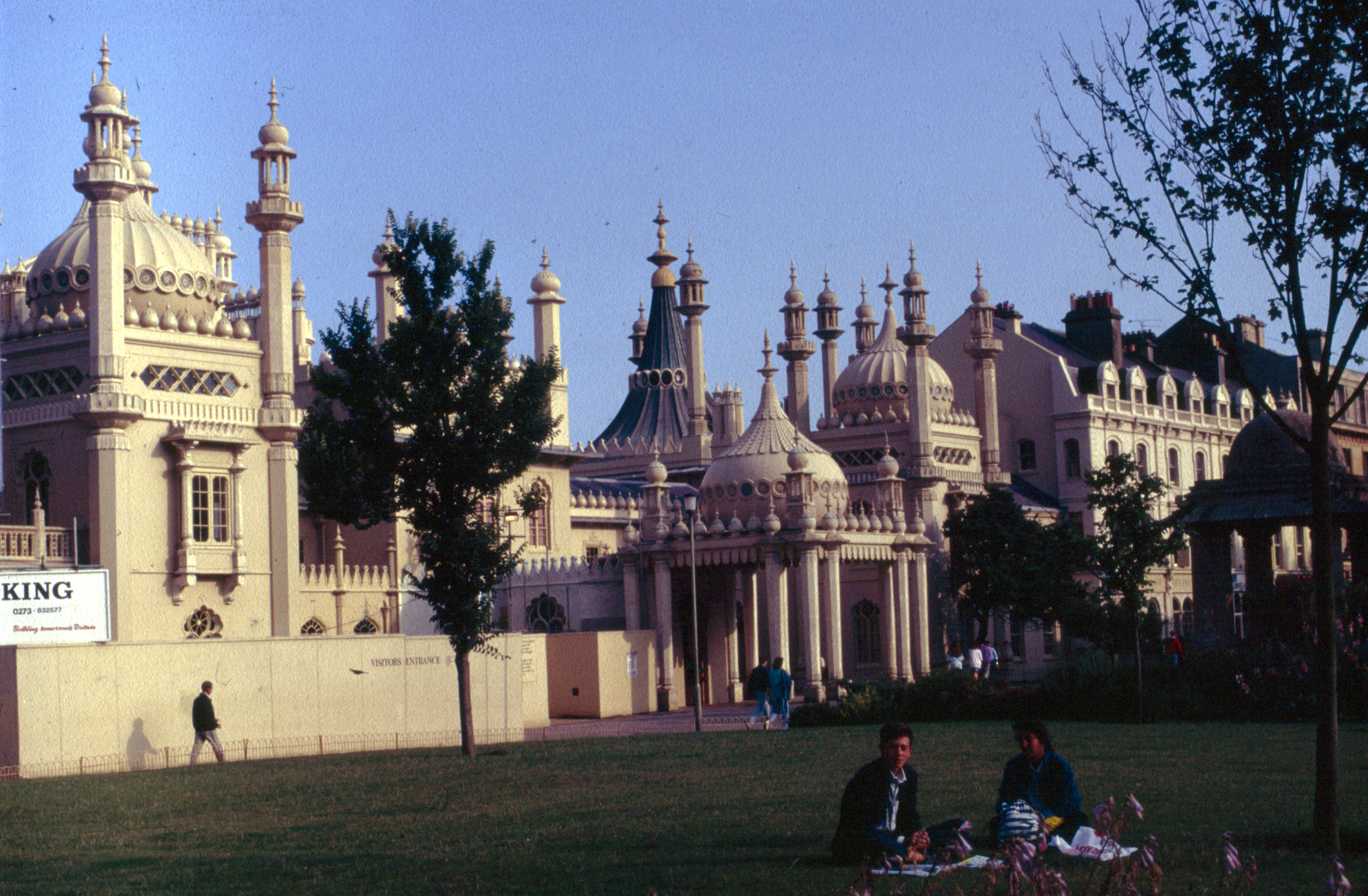 Brighton, East Sussex